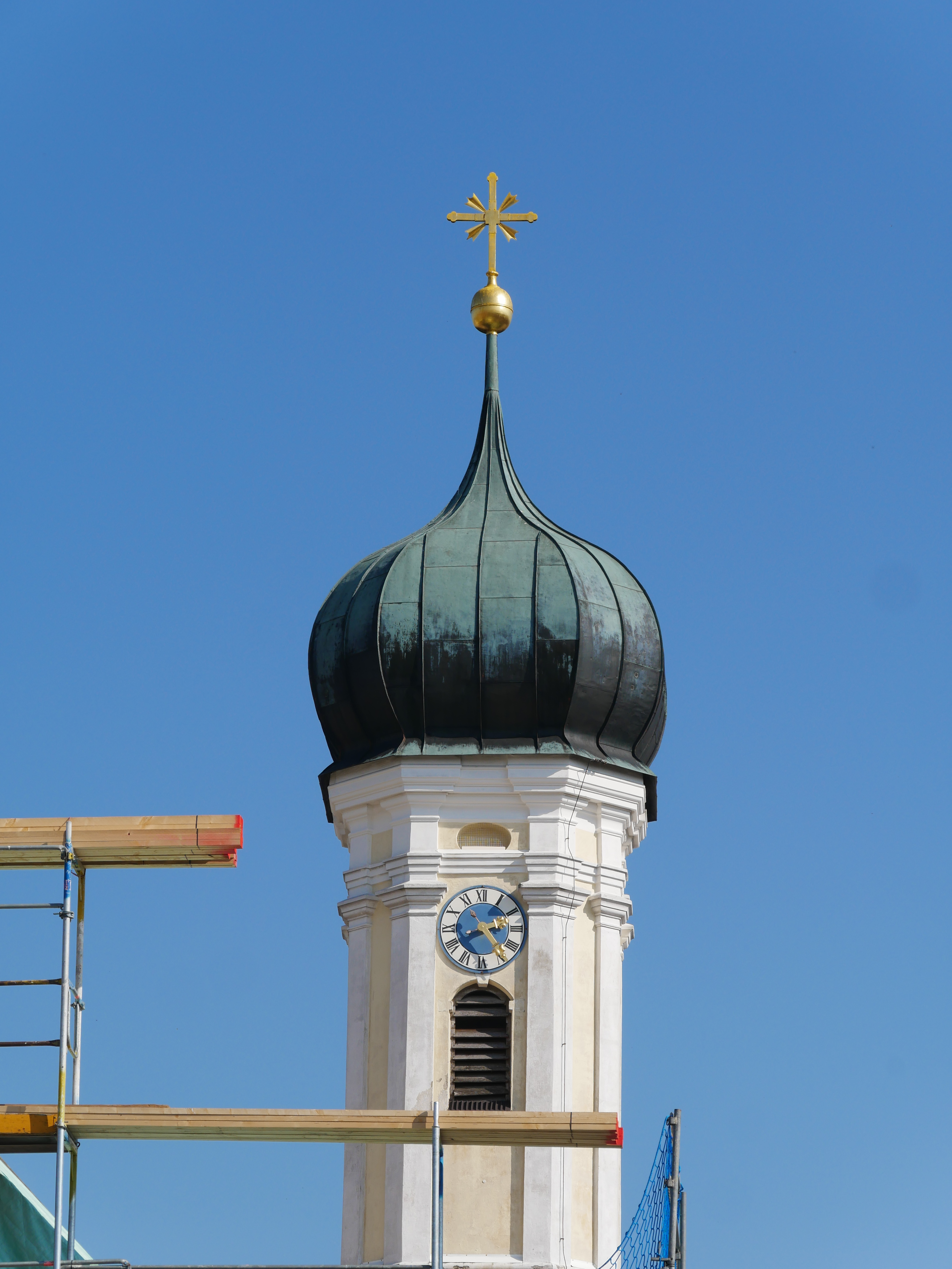 Dasing, Ortsteil Laimering, Riedener Str. 11, Katholische Pfarrkirche St. Georg. Weitere Bilder erst später möglich, da die Kirche z.Zt. Großbaustelle